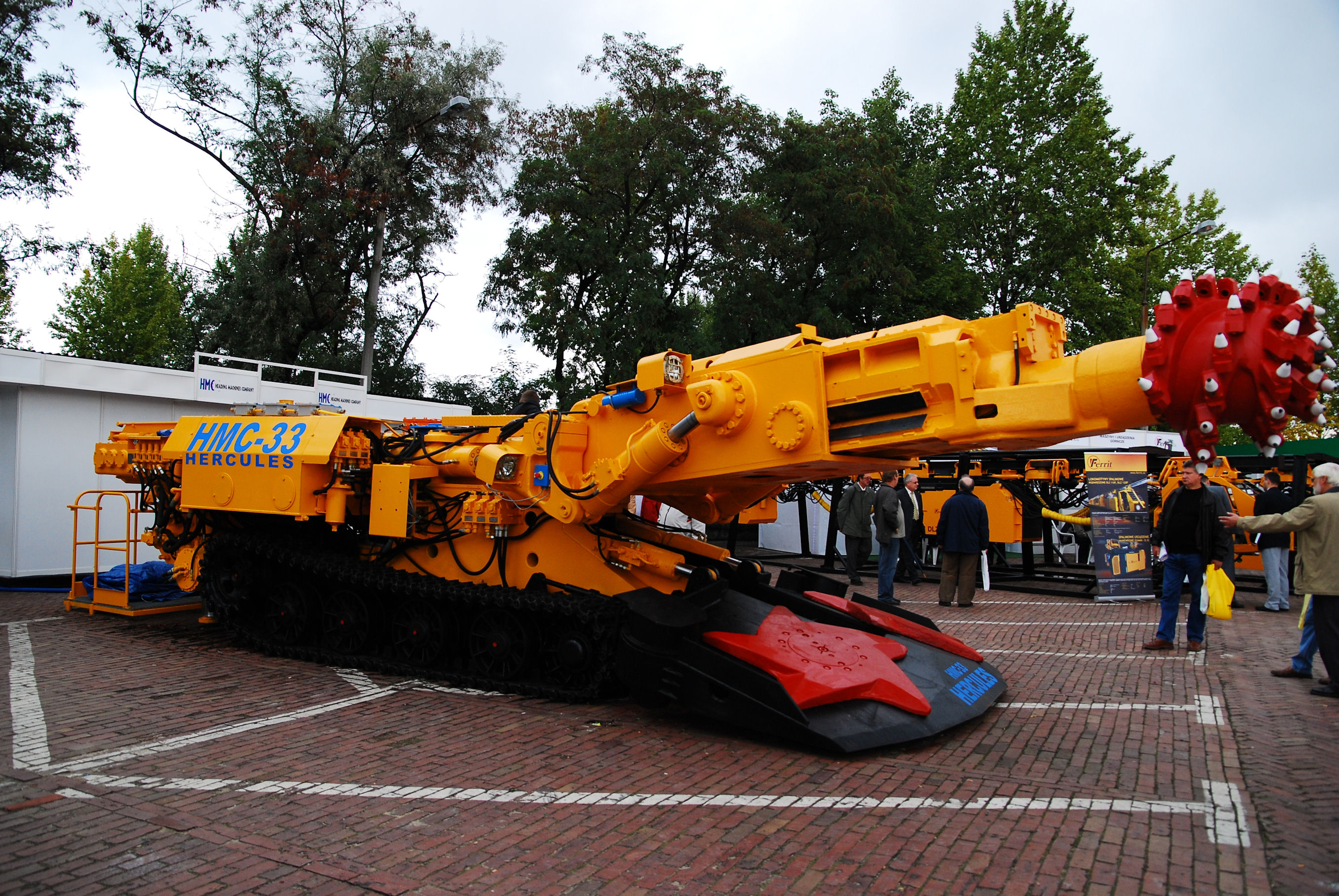 Urządzenie górnicze zdjęcie wykonane podczas Międzynarodowych Targów Górnictwa, Przemysłu Energetycznego i Hutniczego w Katowicach w Spodku